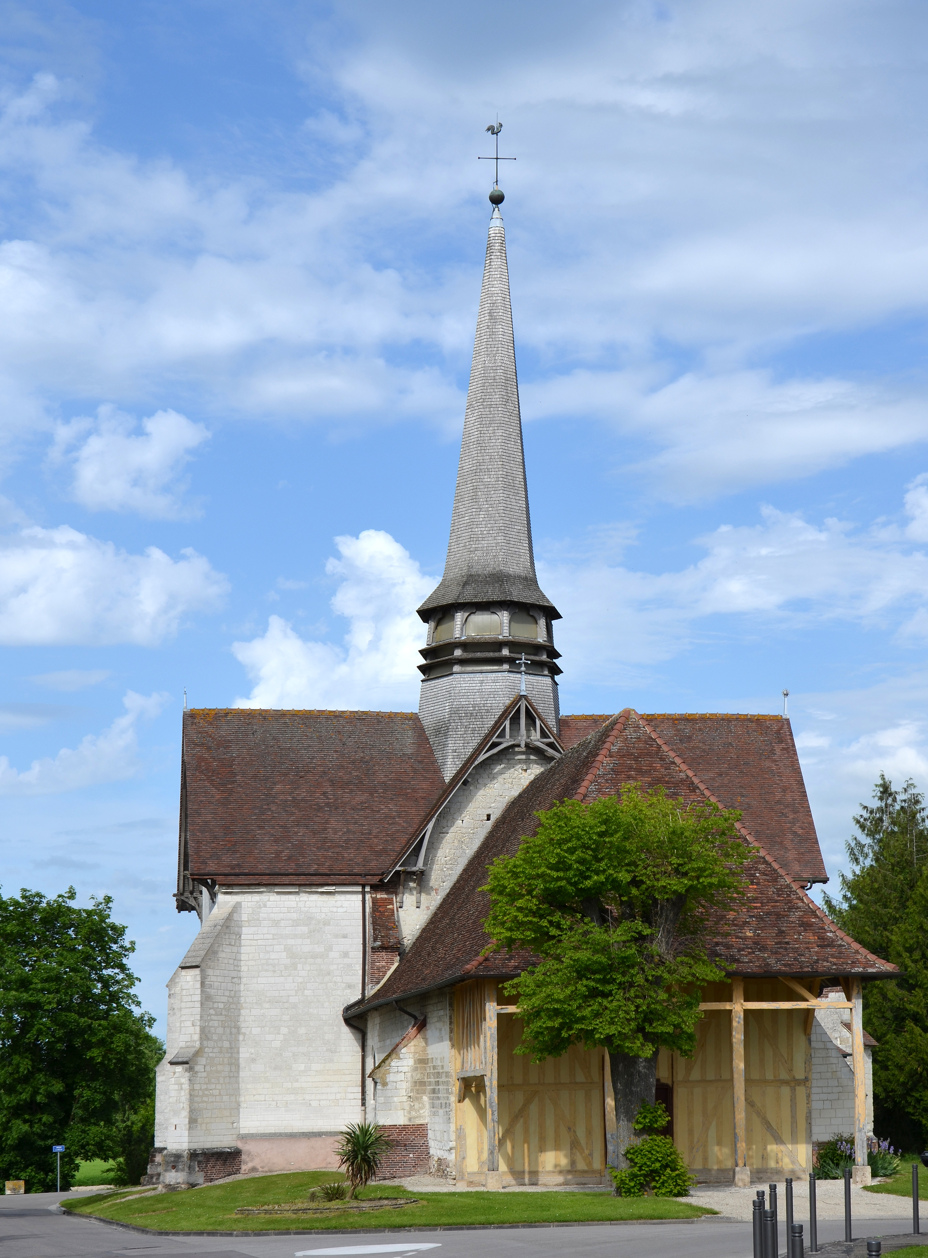 Eglise de Barberey Saint Sulpice, Aube, France